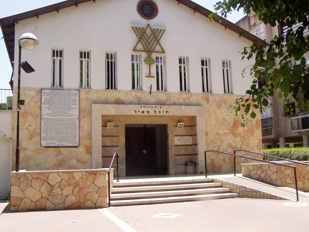 בית כנסת היכל מאיר בפתח תקווה